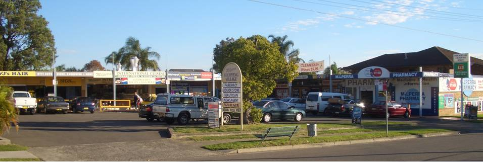 Milperra shops